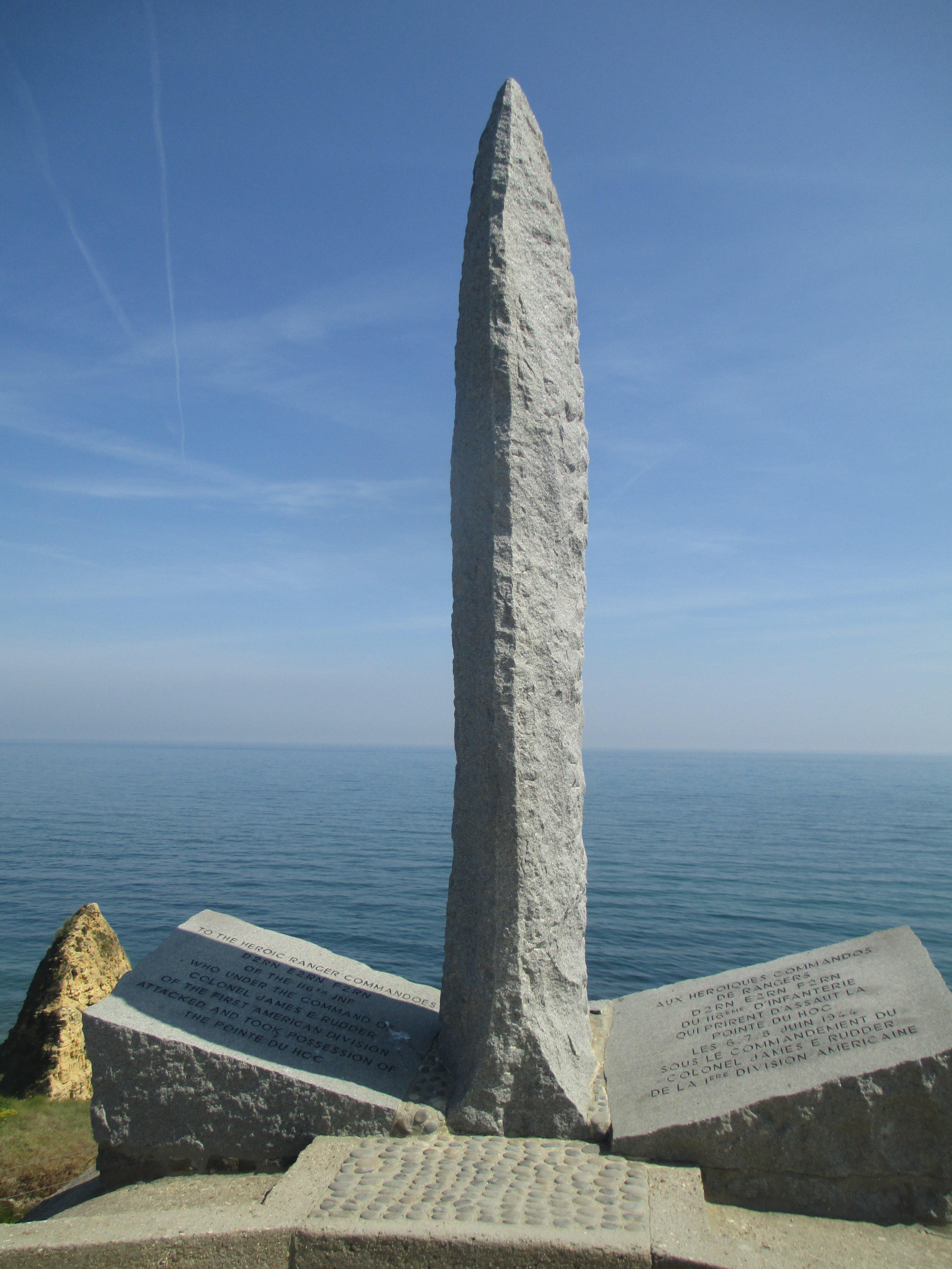 פוינט דו הוק